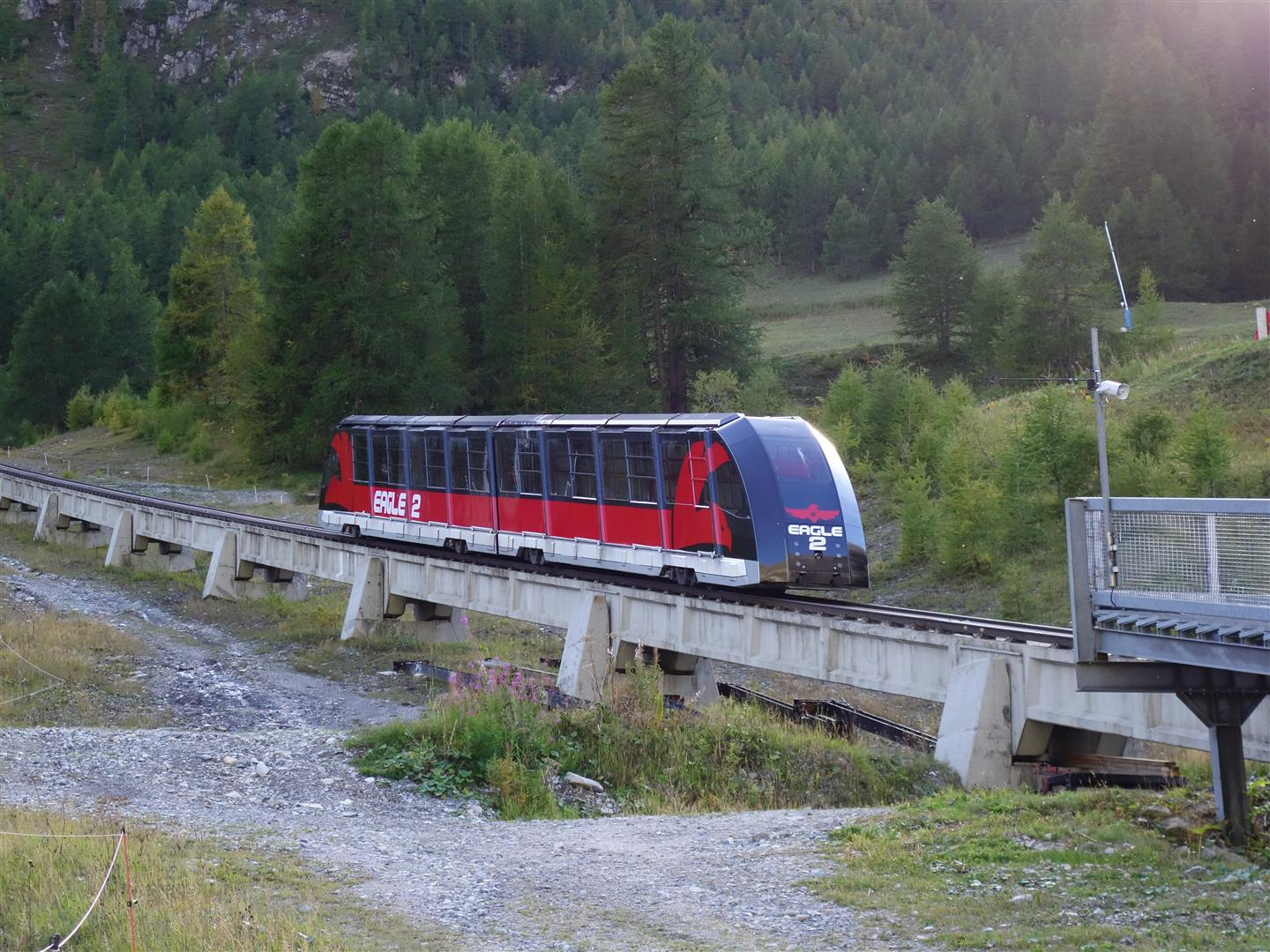 CWA à La Daille